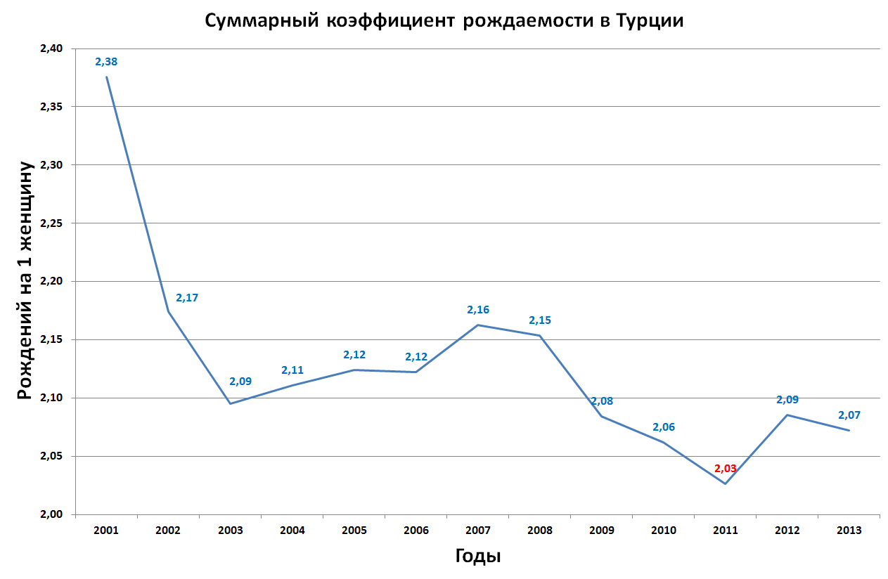 Суммарный коэффициент рождаемости в Турции 2000-2013 гг. по данным Турецкого агентства по статистике.